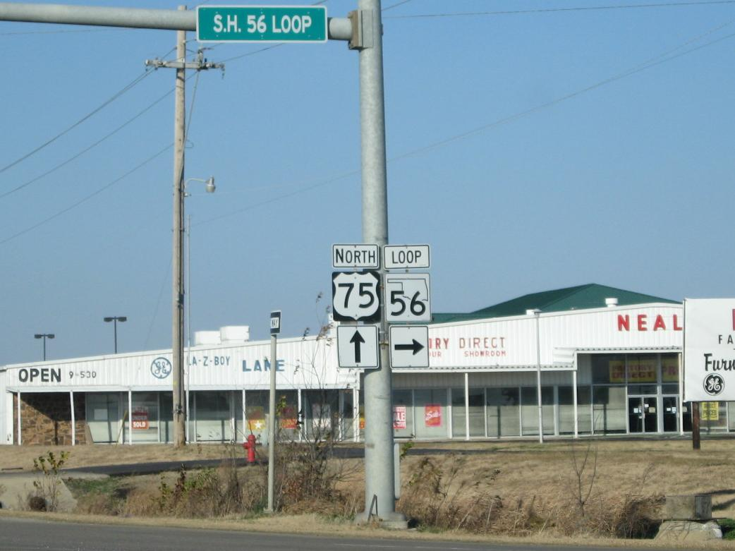 Loop SH-56 from US-75 in Okmulgee, Oklahoma.